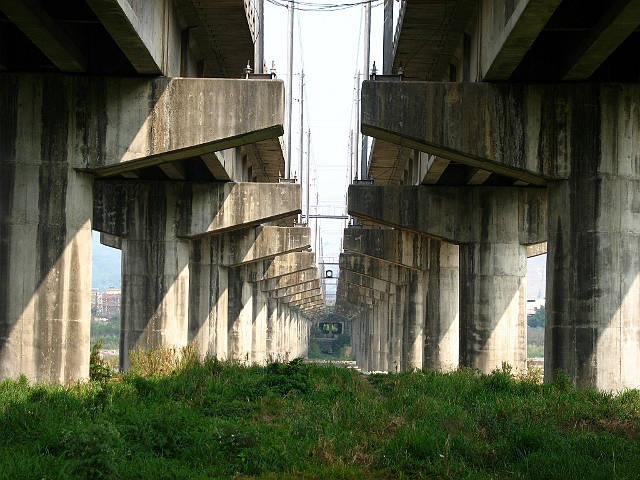 台鐵第三代大肚溪橋(1988_左側海線橋_右側山線橋) was filmed by TDCKW on 20070218